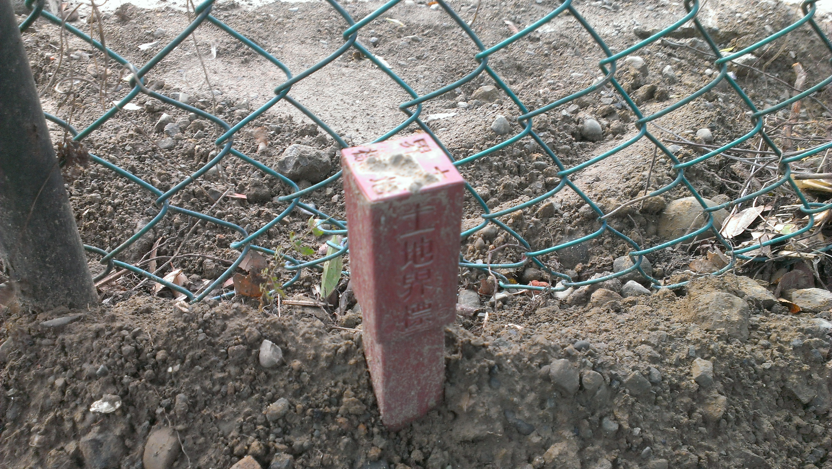 中文（台灣）: 常見的土地界標。